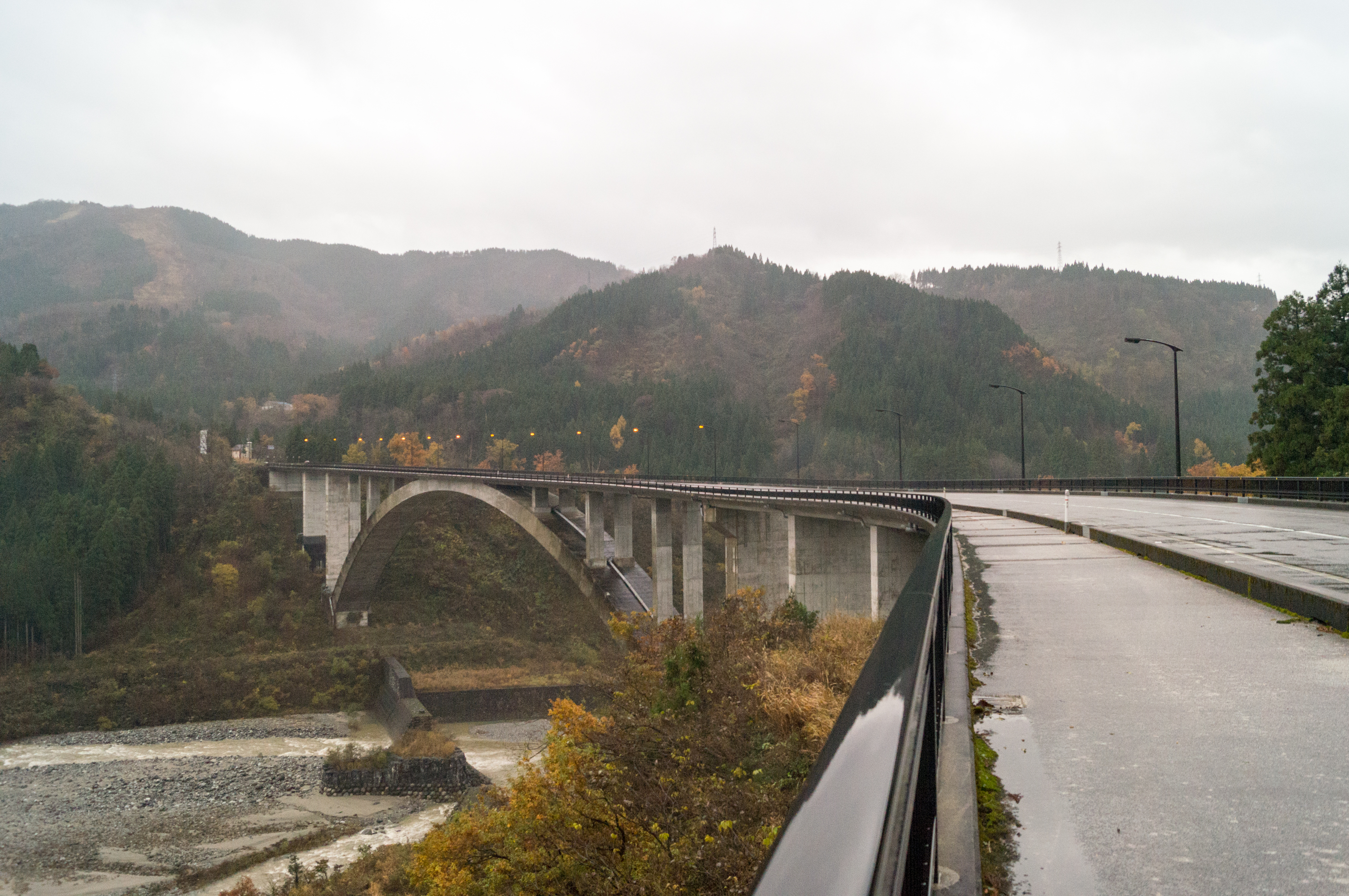 立山大橋。